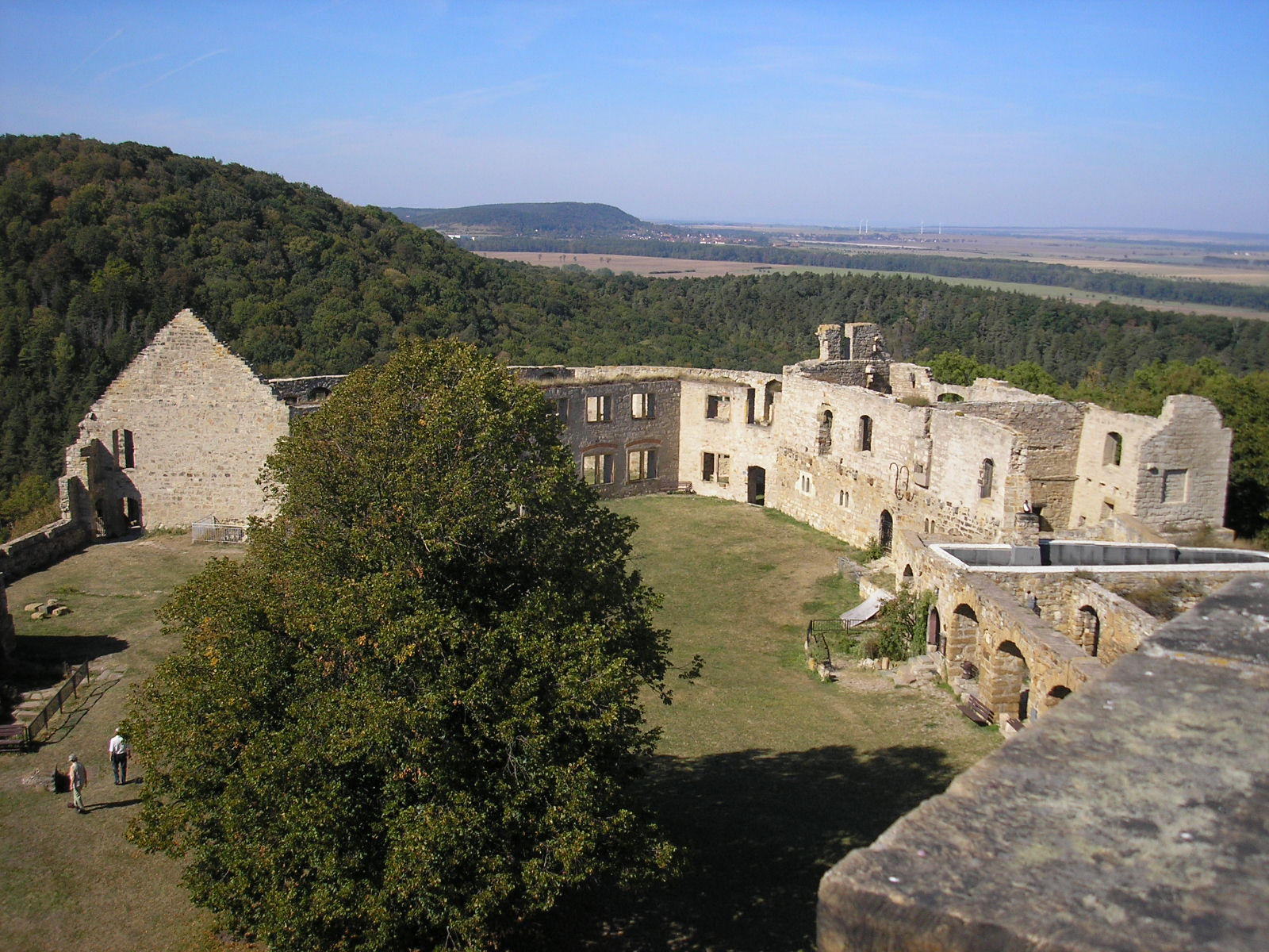 Teile der Burg Gleichen in Thüringen vom Bergfried gesehen.